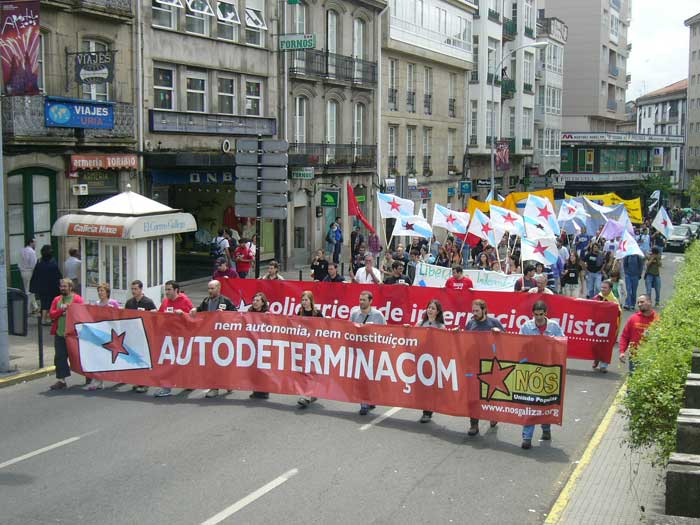 Manifestaçom Dia da Pátria Galega, 25 de Julho de 2005